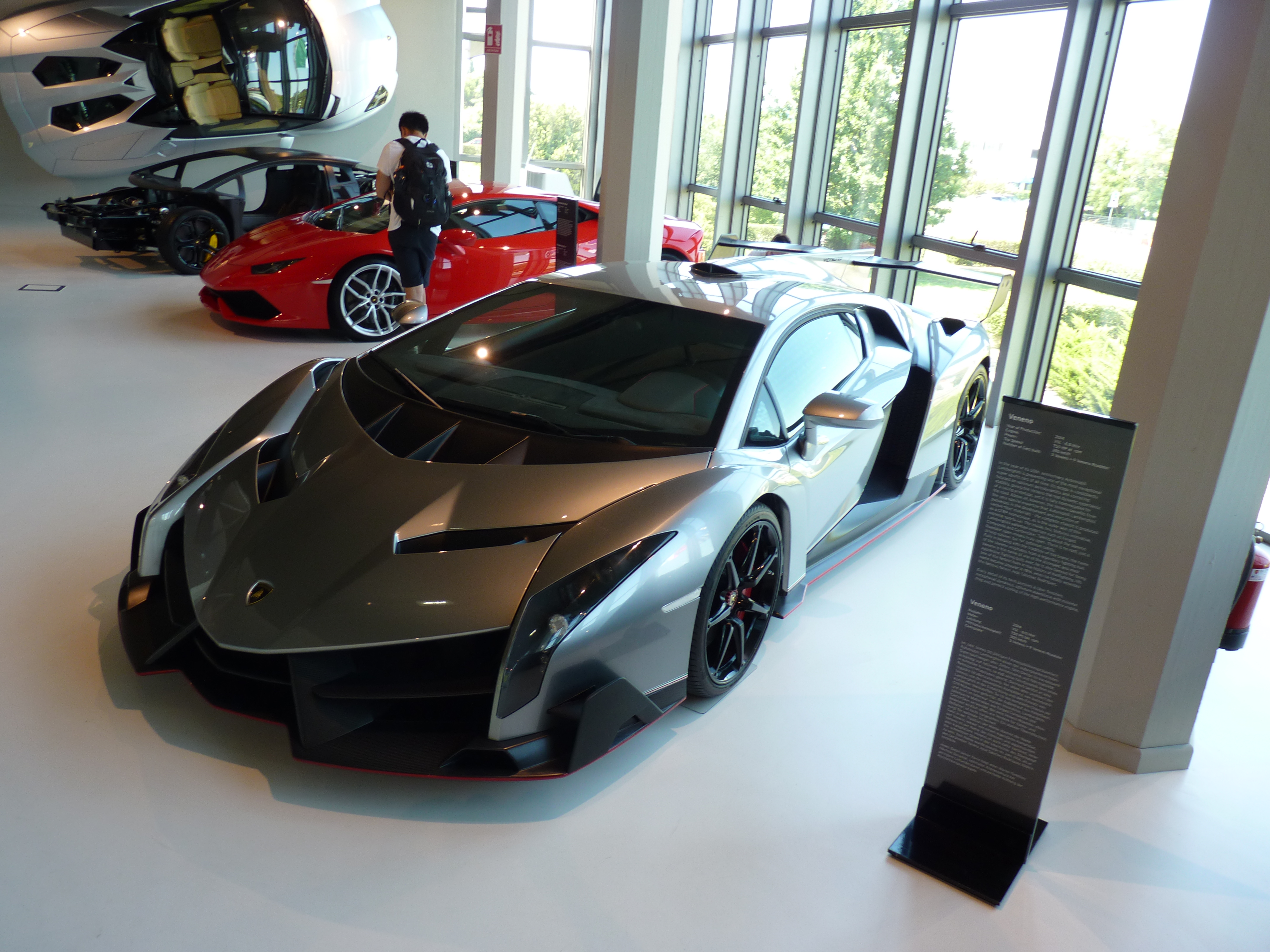 Lamborghini Sesto Elemento au Musée Lamborghini